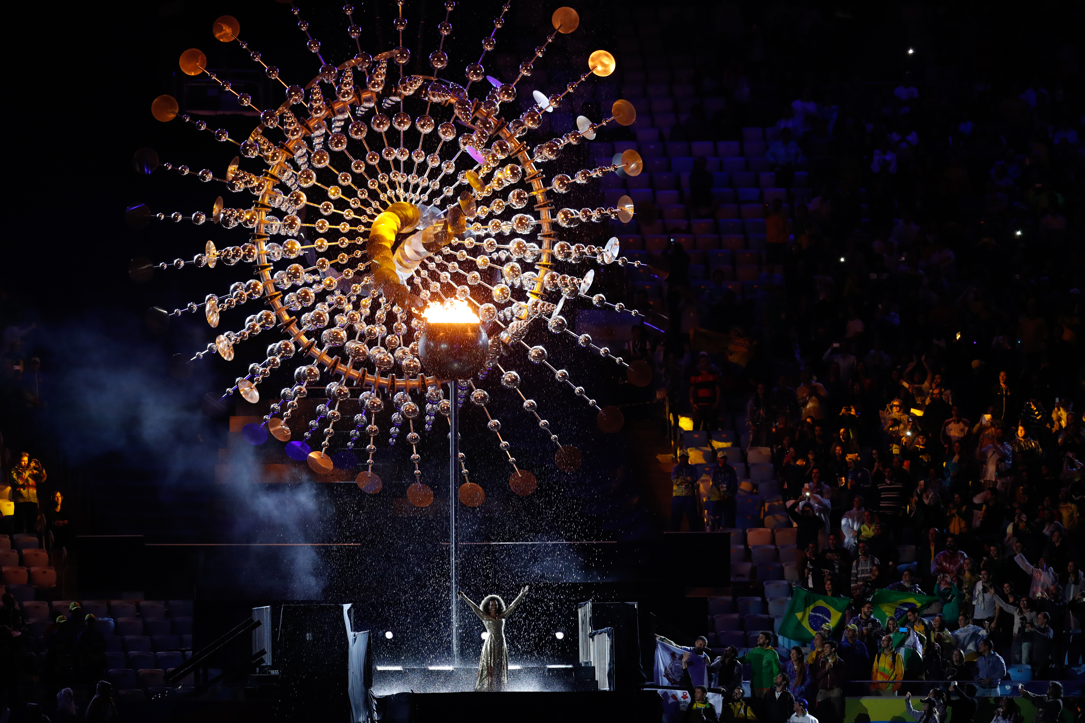 Rio de Janeiro - Cerimônia de encerramento dos Jogos Olímpicos Rio 2016, no Maracanã (Fernando Frazão/Agência Brasil)